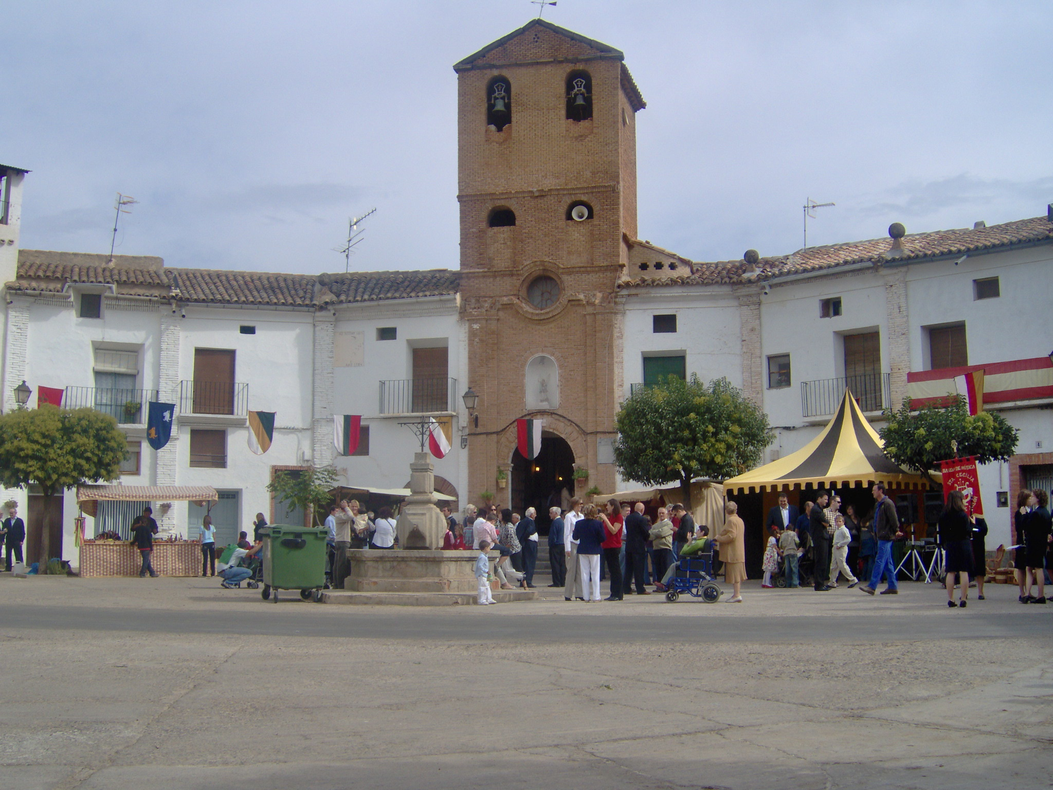 imágen del mercado medieval en las fiestas de chodes de 2007